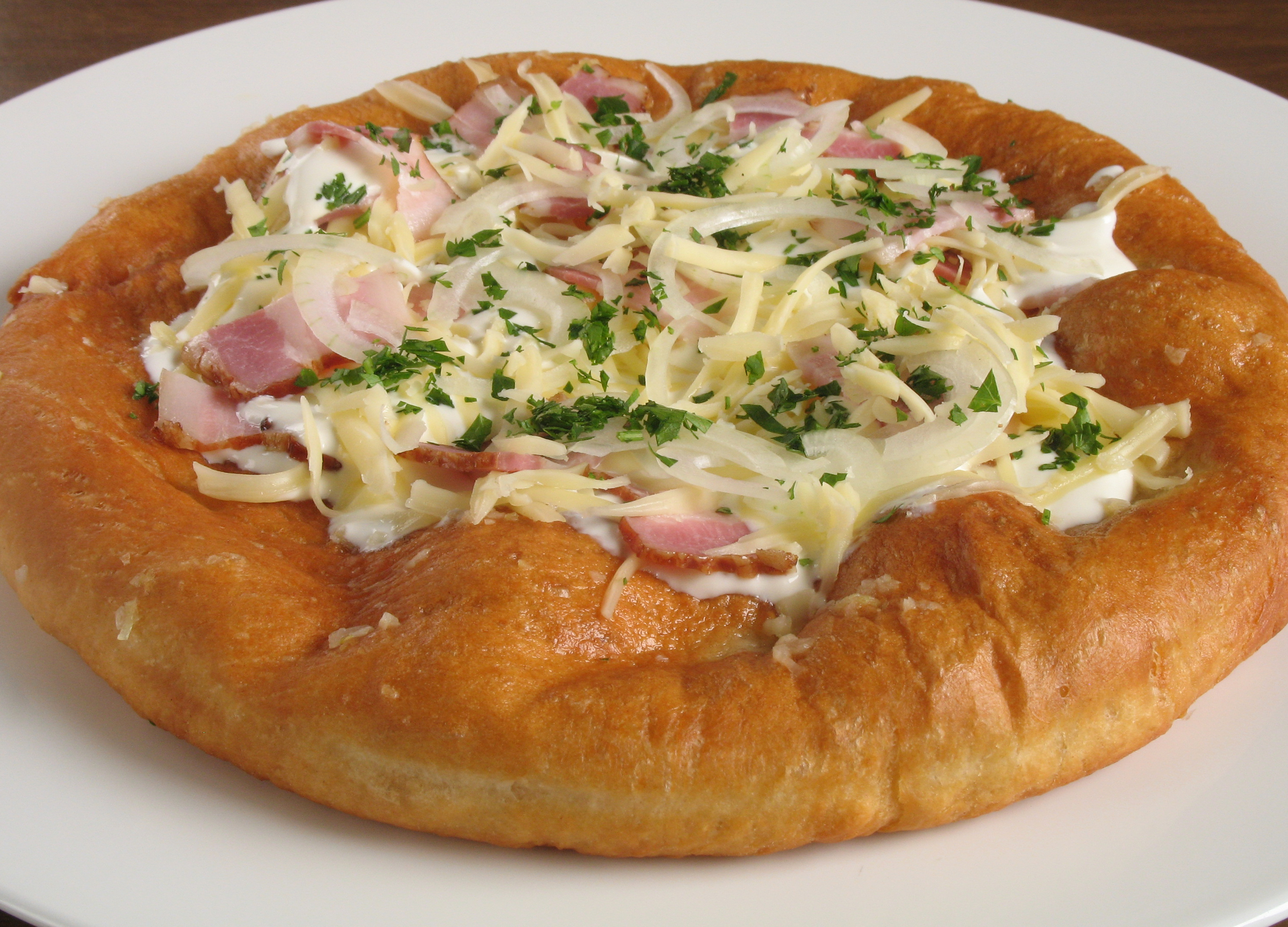 Lángos